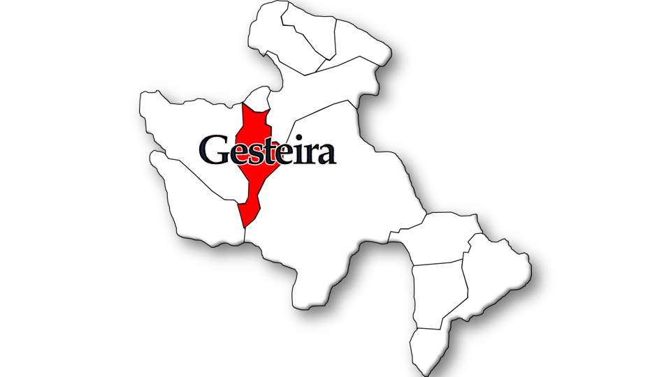 População